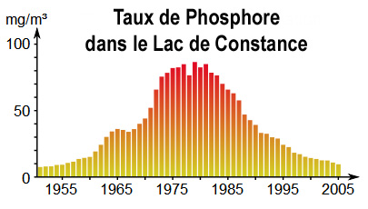 Taux de phosphore dans le lac de Constance, 1950-2005